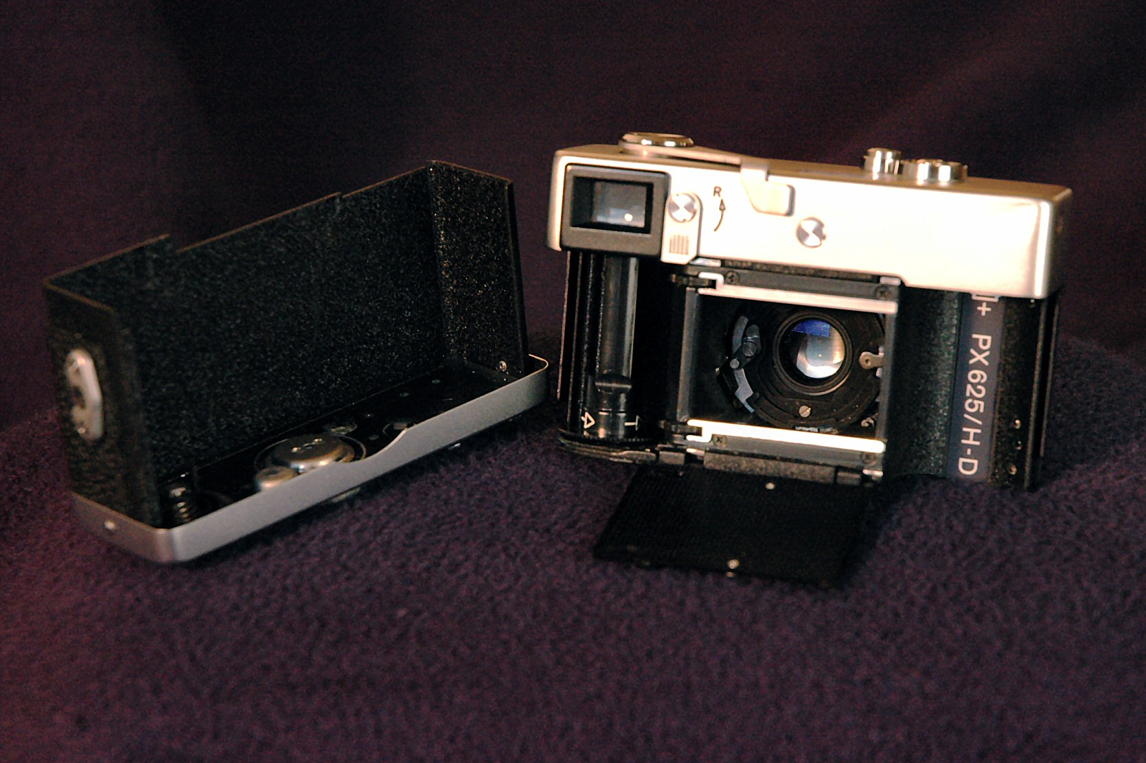 Rollei 35S, geöffnet (beide Teile)